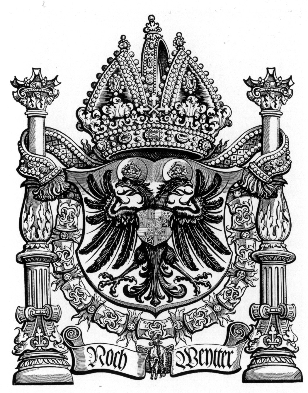 Wappen Karls V . mit Hauskrone des Kaisers, dem Orden des Goldenen Vließes, den Säulen des Herkules und dem Motto "noch weytter" (plus ultra), Holzschnitt von Heinrich Vogtherr d. Ä., 63 x 49.5 cm, wohl Augsburg um 1547/48